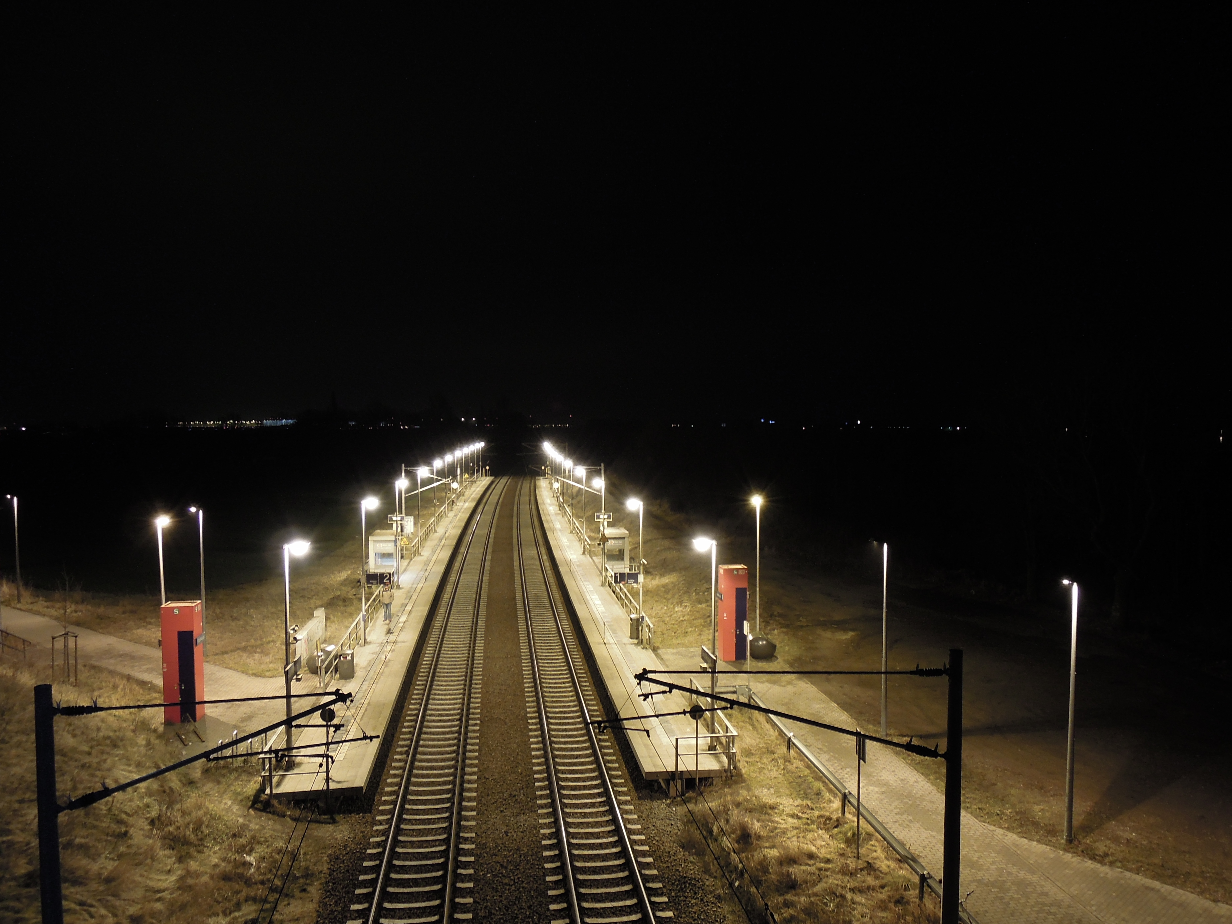 Haltepunkt Großkugel bei Nacht im Frühjahr 2015